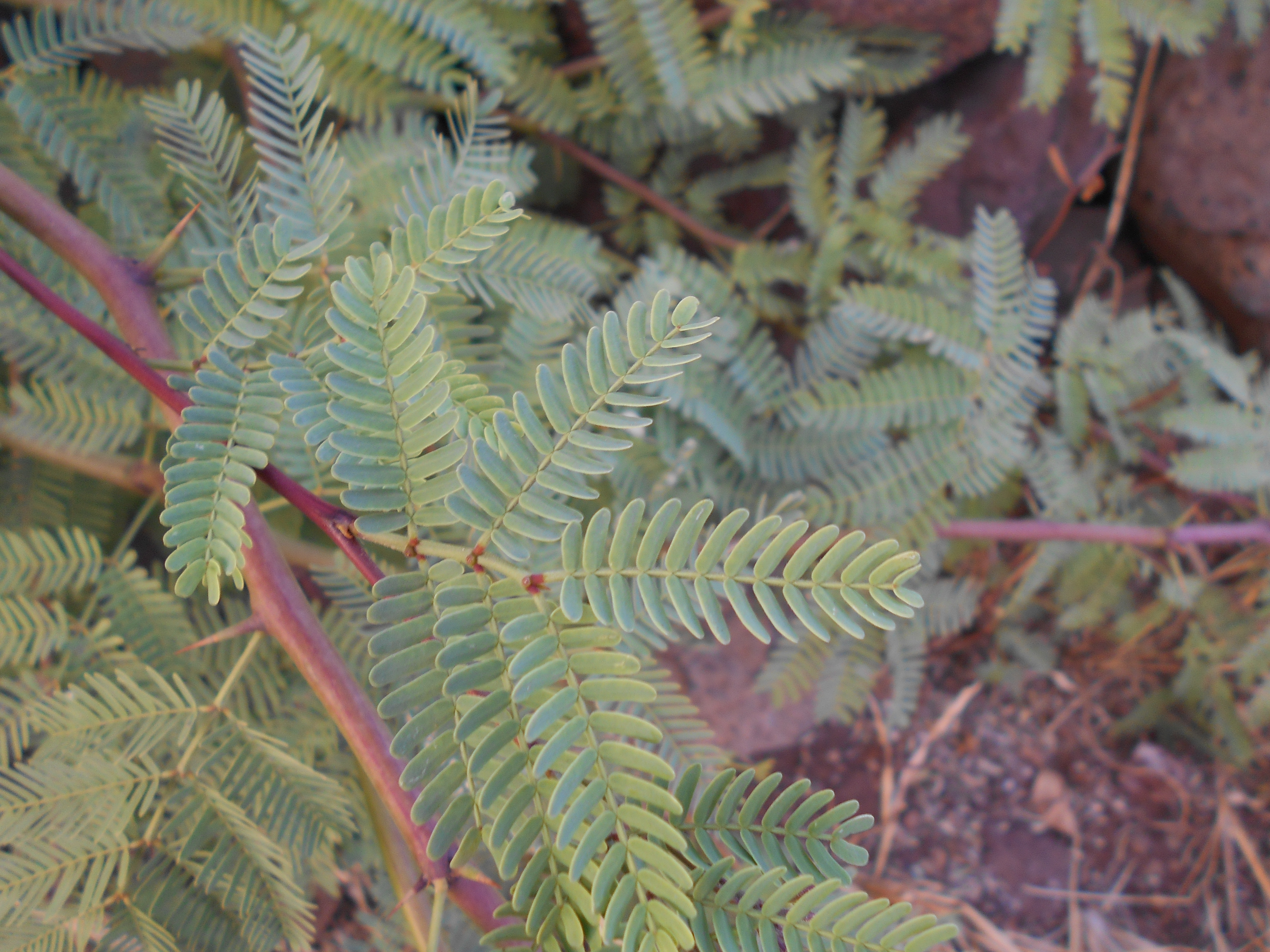 Foglie di faidherbia albida.